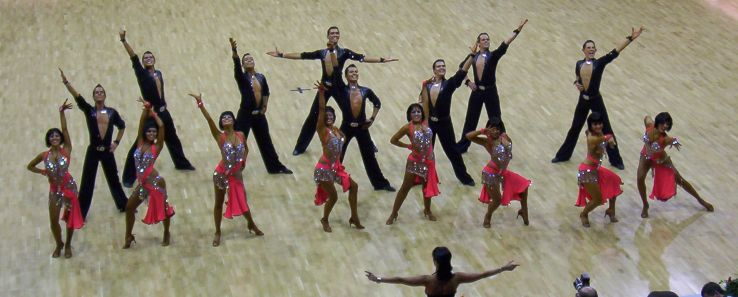 Lateinformation des Grün-Gold-Club Bremen (B-Team) bei der Deutschen Meisterschaft der Formationen 2008